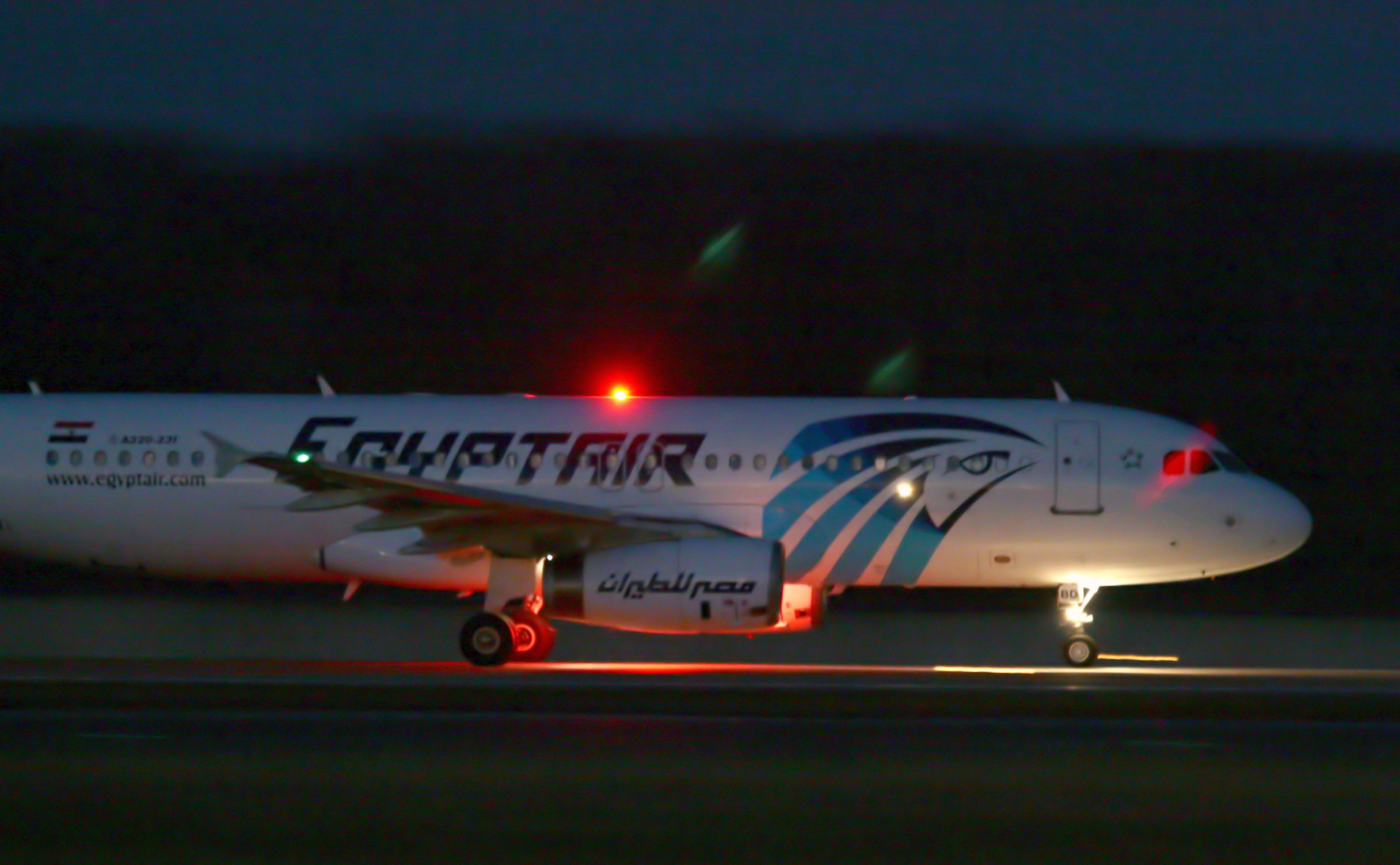 Egyptair